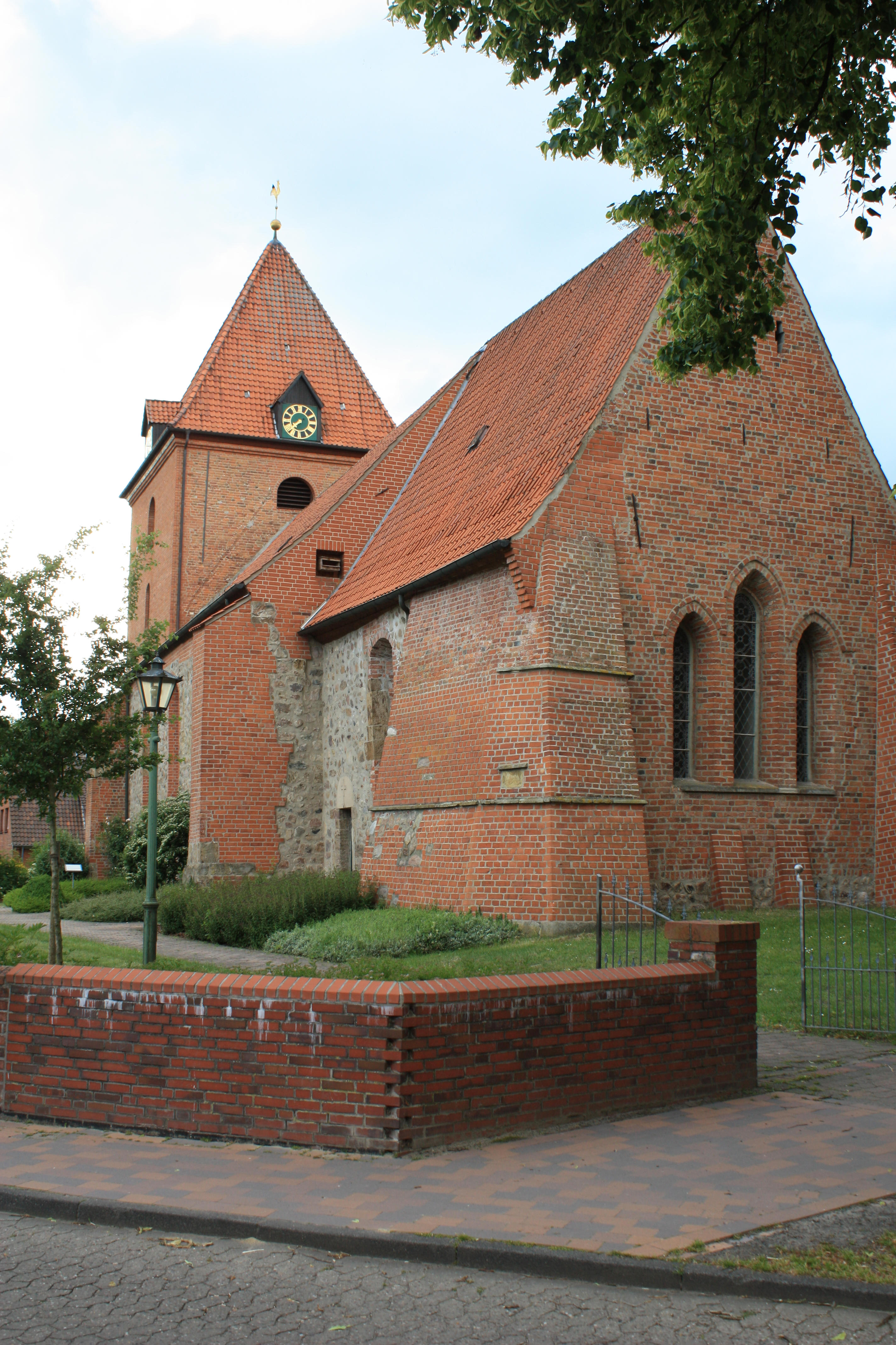 St. Bartholomäus (Barrien) in Syke-Barrien